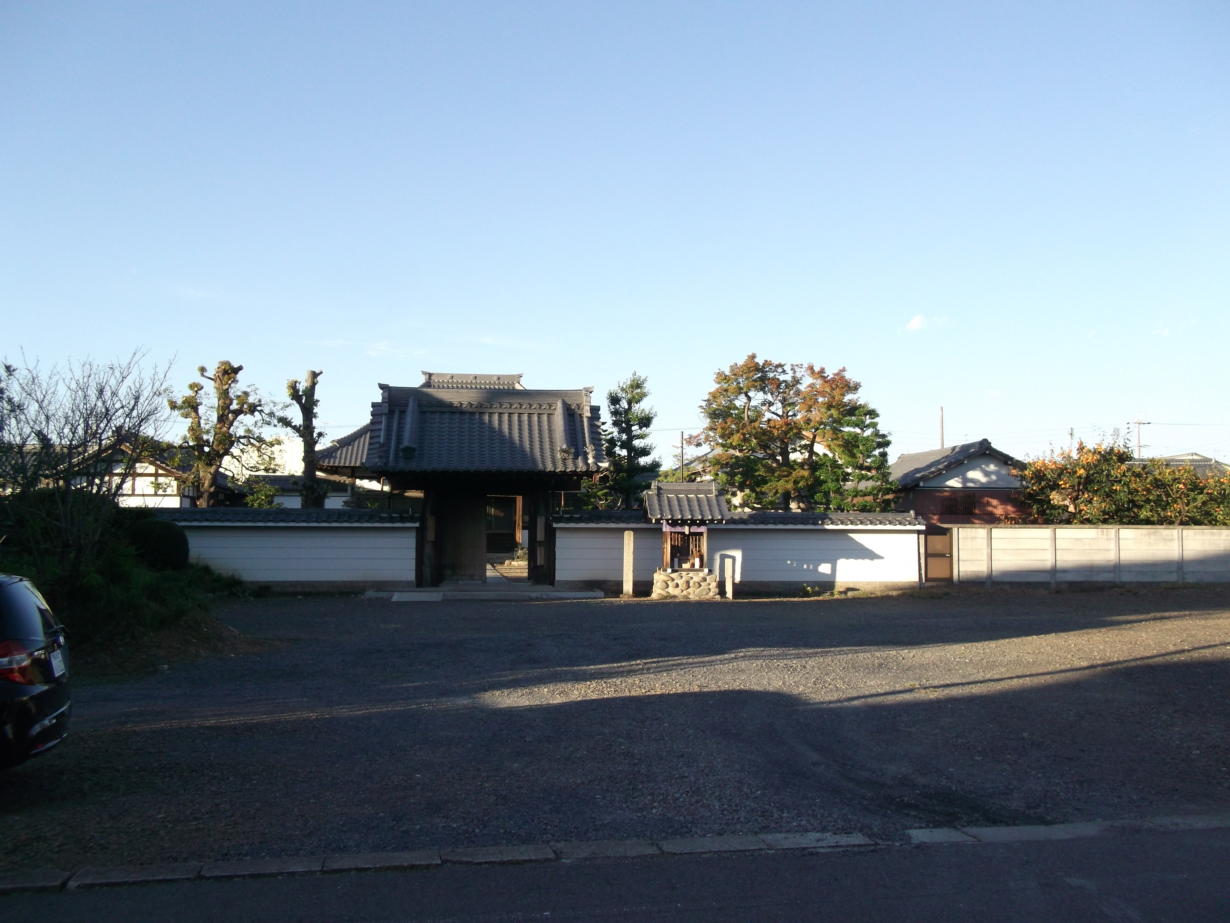 愛知県春日井市美濃町の曹洞宗青原寺を南側公道から撮影